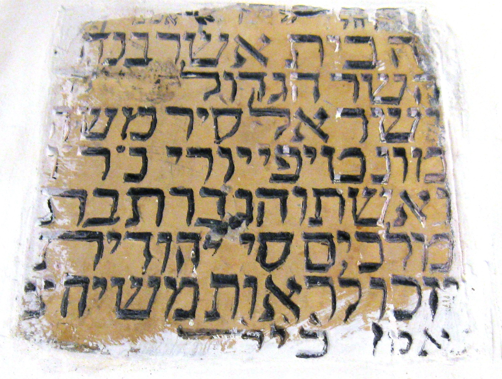 כתובת לזכר מונטיפיורי בקבר רחל רישיון נוצר על ידי משתמש:Daniel Ventura